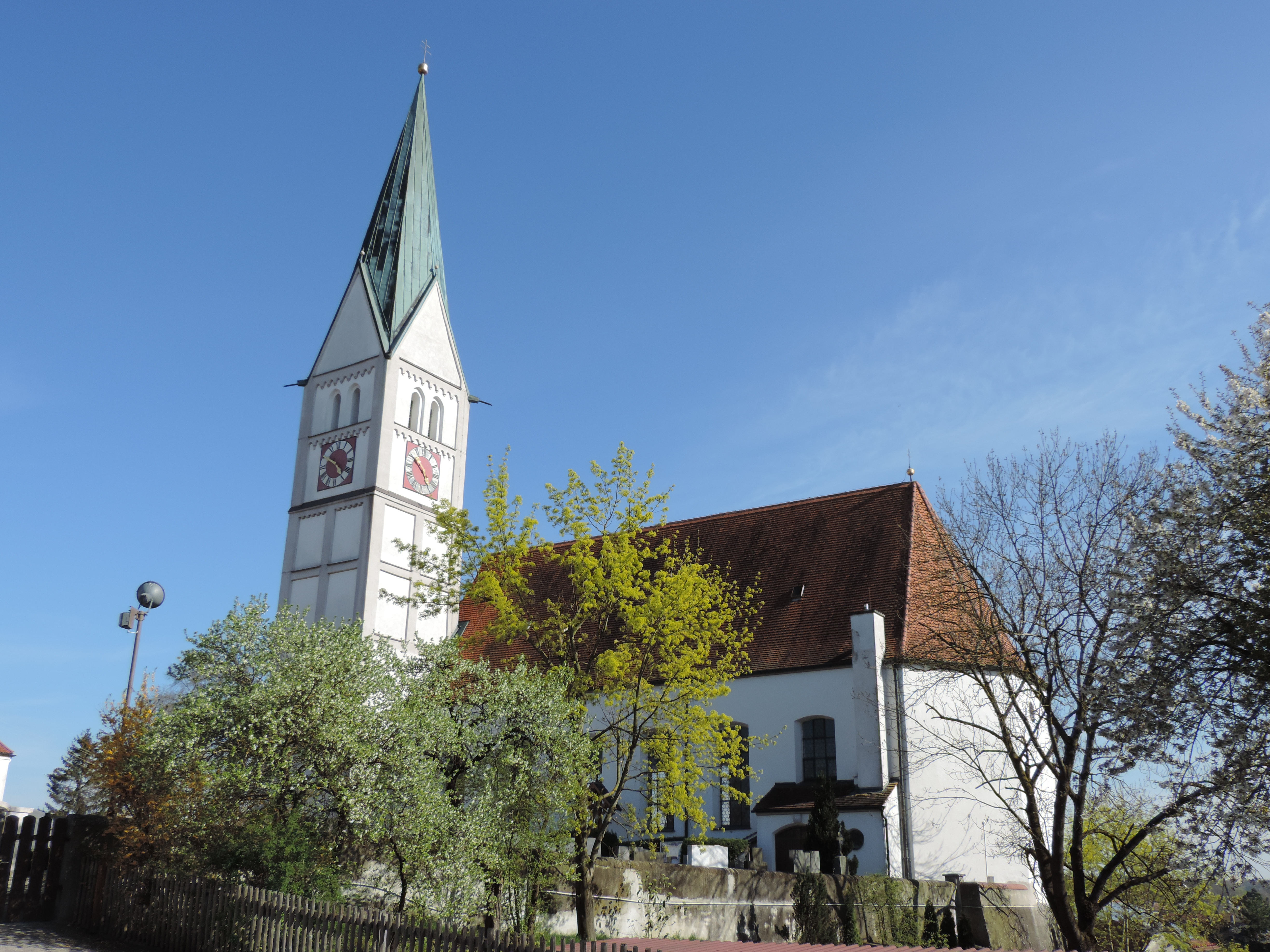 Nordwestansicht